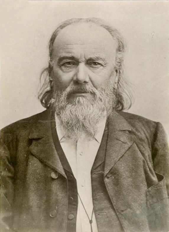 Zsolnay Vilmos keramikusművész, nagyiparos